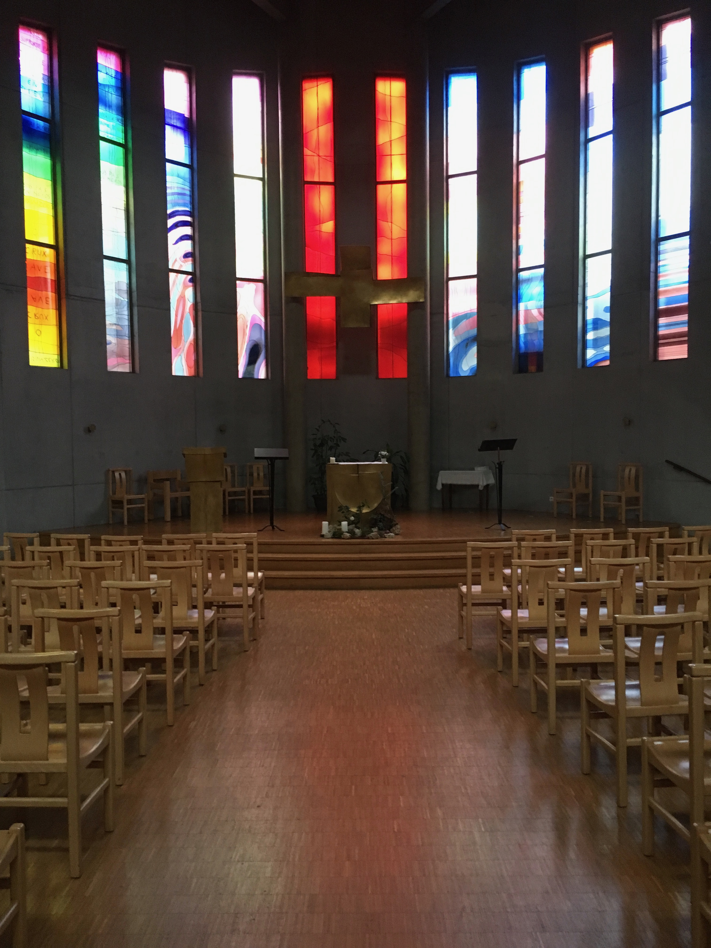 Vue intérieure de la nef de l'église Sainte Croix d'Ivry-Port